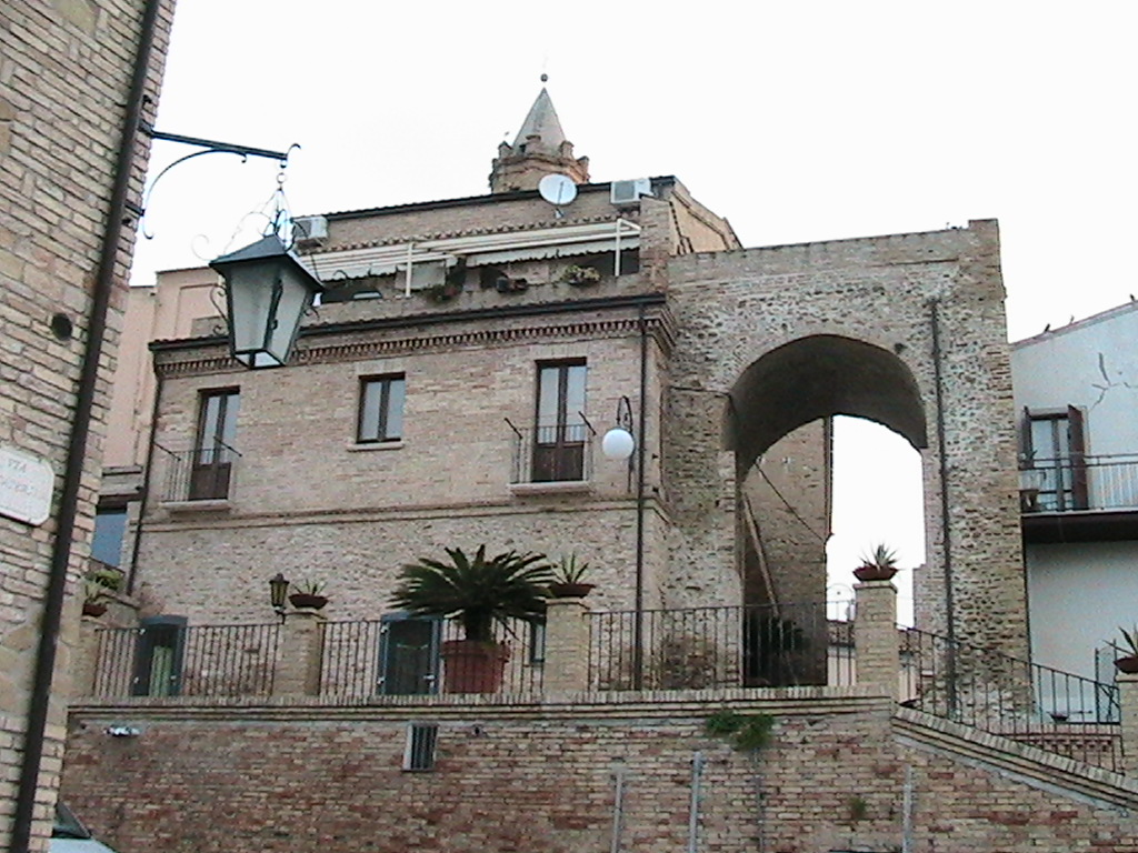 Scorcio